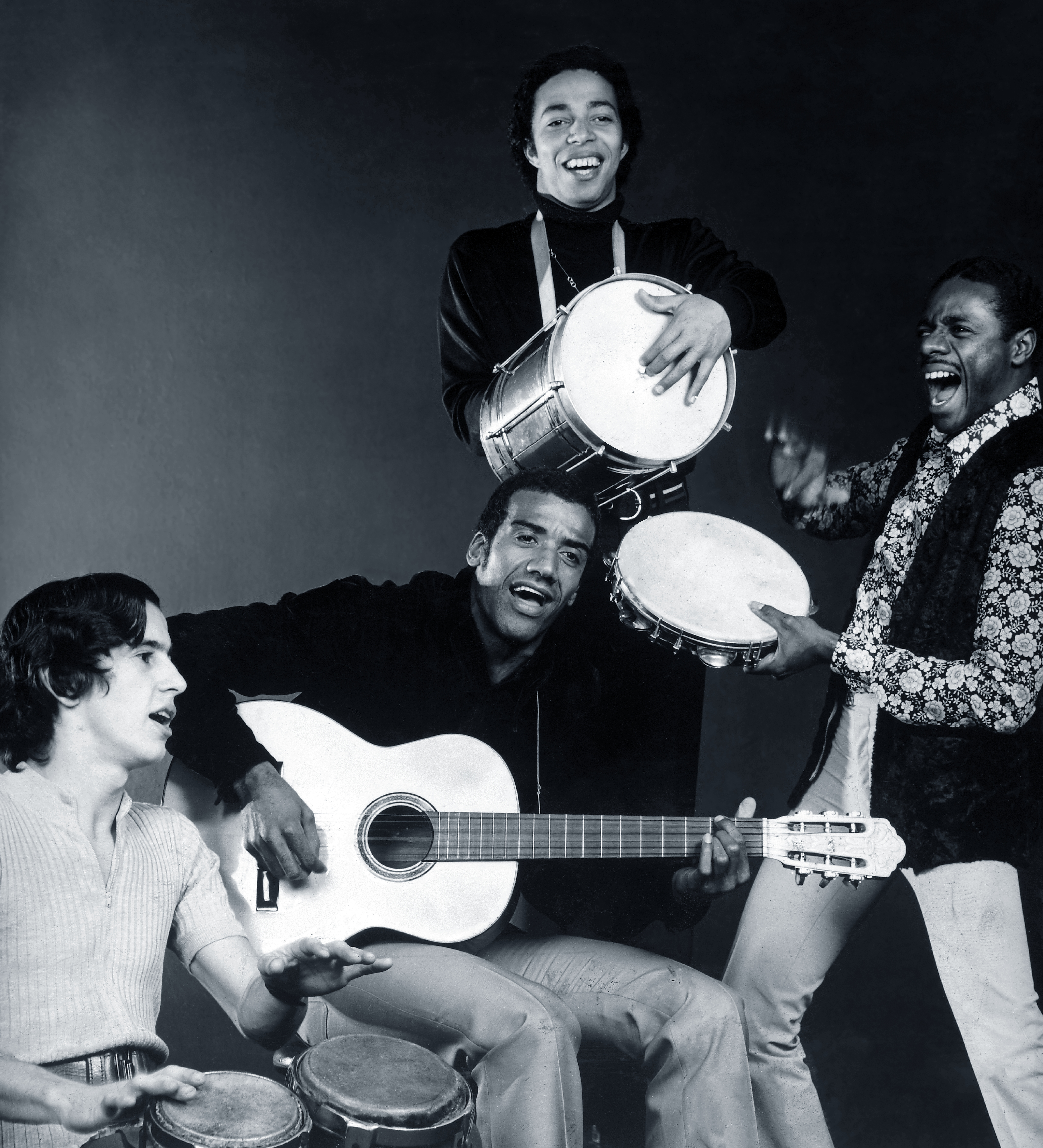 Fundo Correio da Manhã.